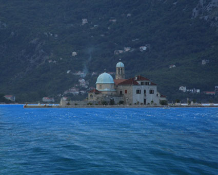 Ostrvo Gospa od Škrpjela, Nikostrat